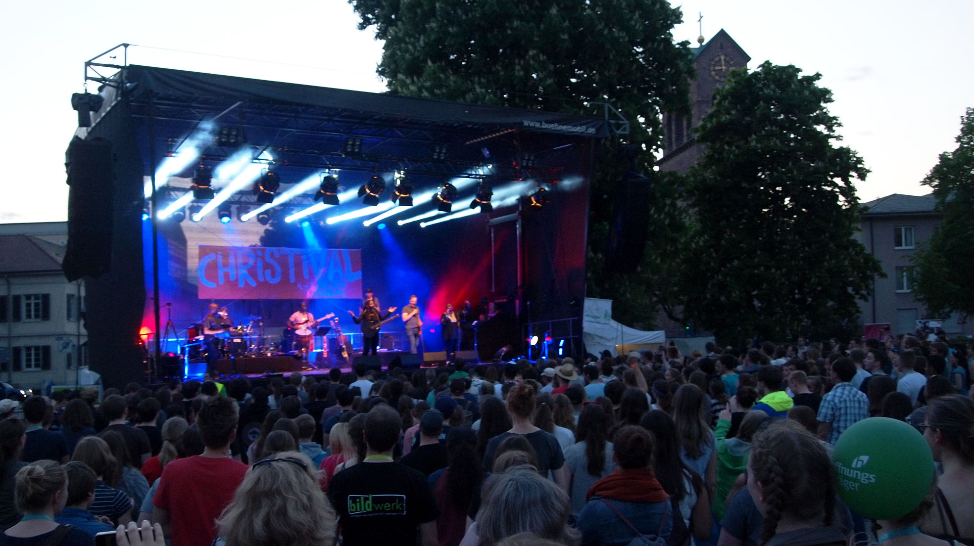 Judy Bailey beim Christival 2016 auf dem Friedrichsplatz in Karlsruhe